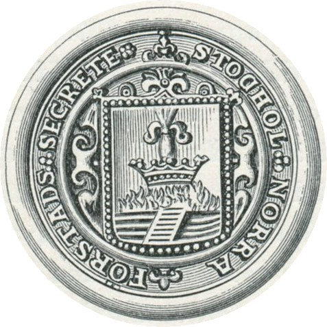 Norrmalns sigill